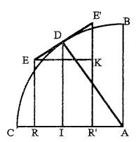 Дифференциальный треугольник Паскаля